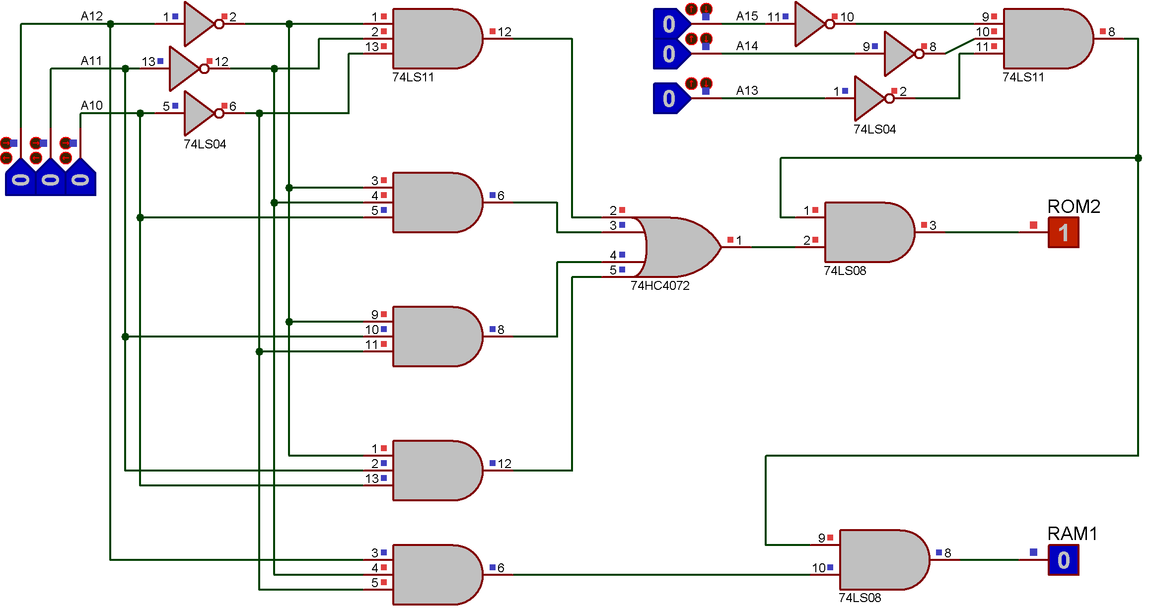 Exemple de logique de décodage d'adresses.